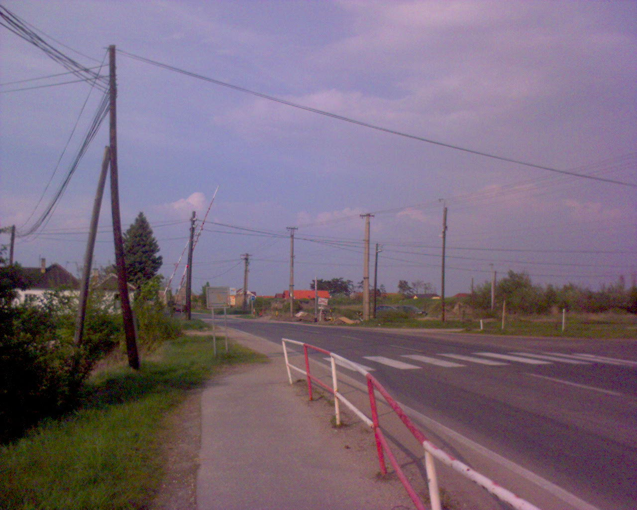 eigen foto